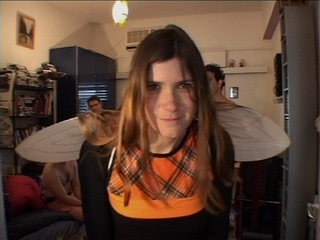 אורלי בויום בסרטה All My Exxx